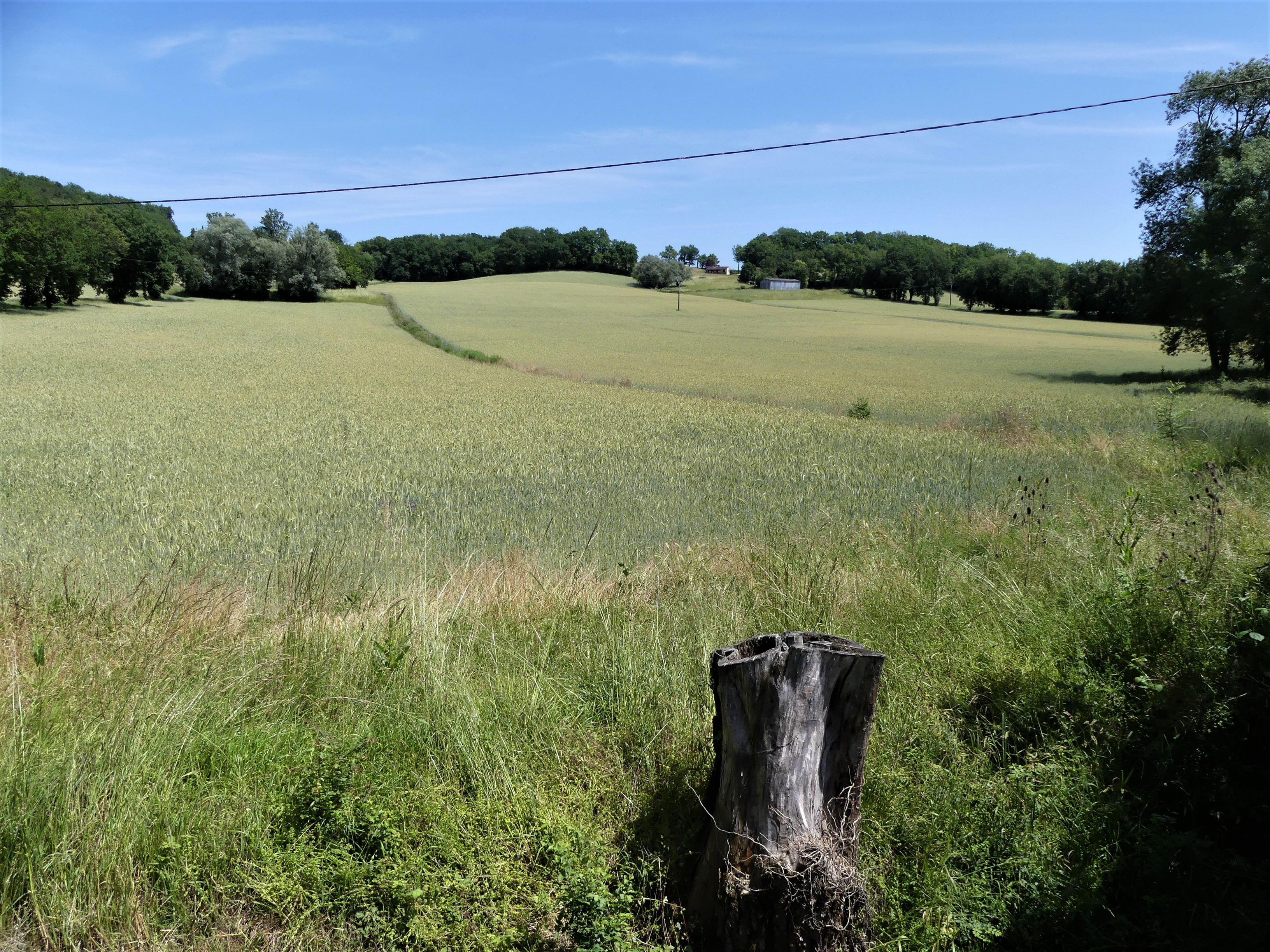 Coteau à l'est de la Douyne et de la route départementale 416, un kilomètre au nord du bourg de Montauriol, Lot-et-Garonne, France.